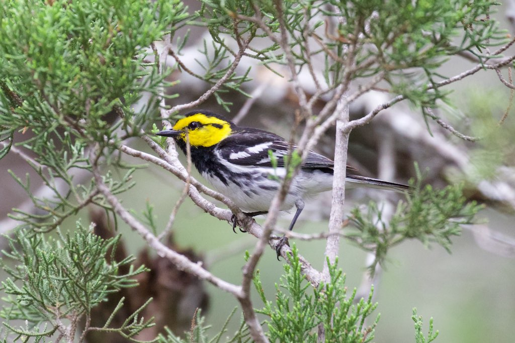 Golden-cheeked Warbler (male)|Kerr WMA|TX | 2015-05-24at13-39-526